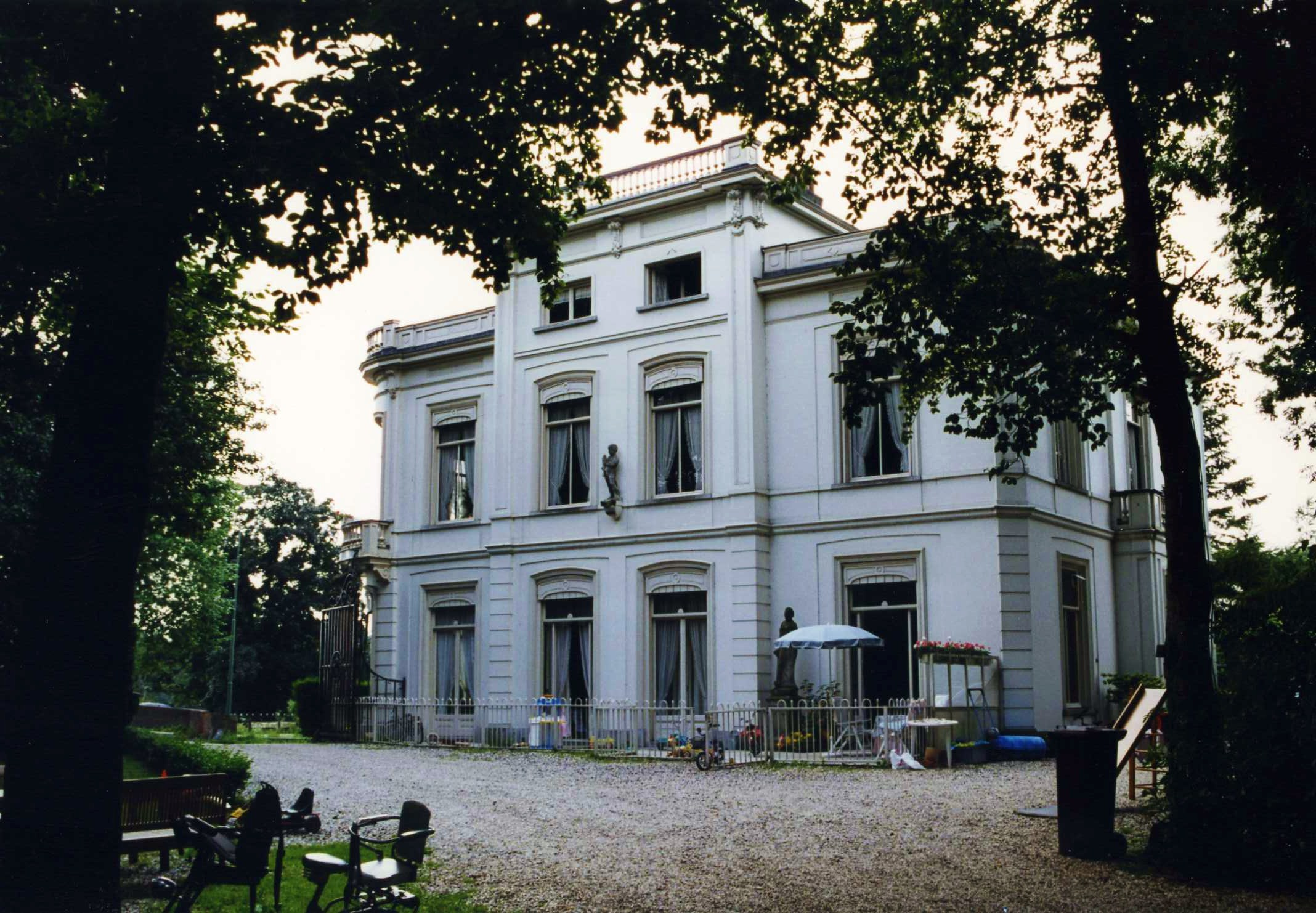 Huis Voorn te Utrecht.